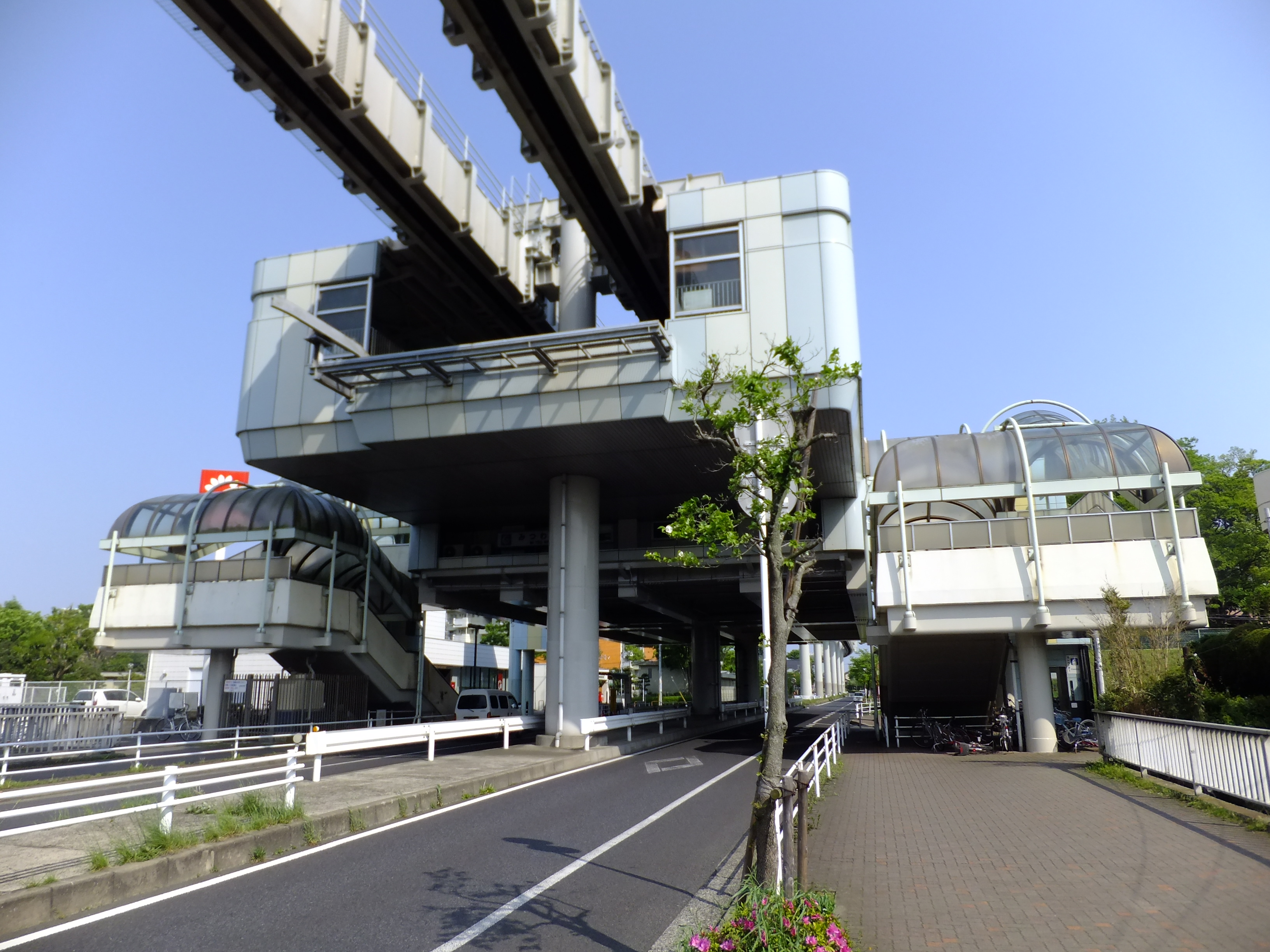 千葉都市モノレールみつわ台駅